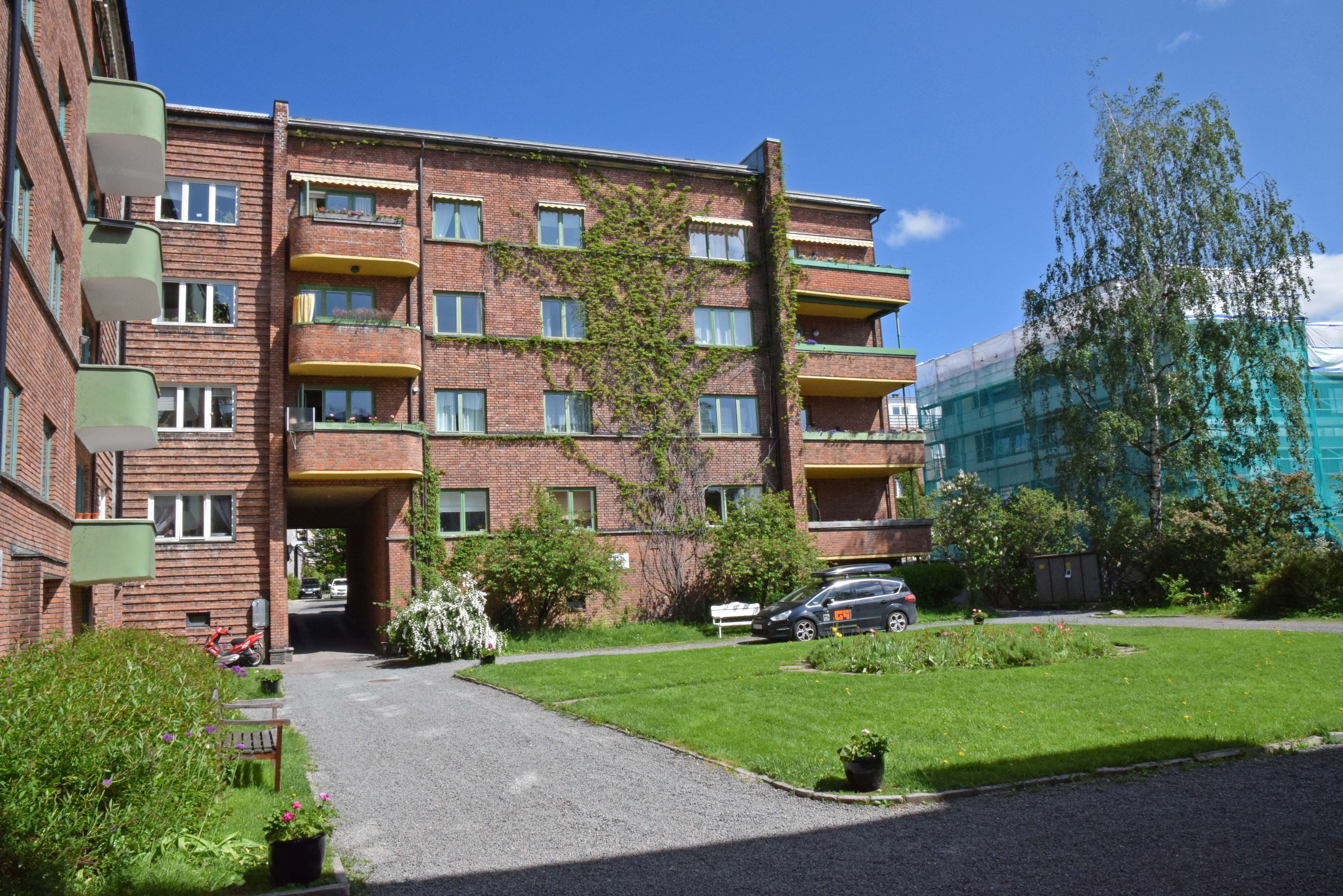 Ole Fladagers gate 8 og 10A (med grønne balkonger til venstre), Majorstuen.